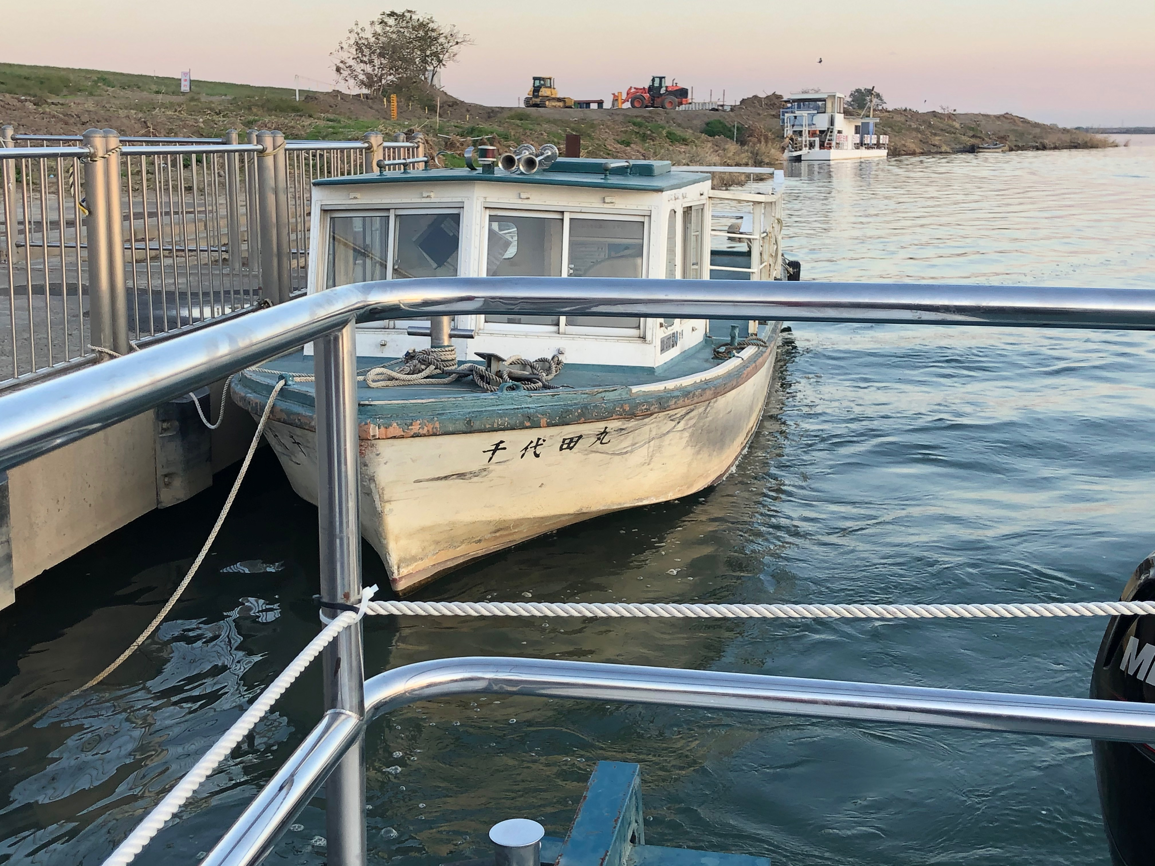 赤岩渡船の千代田丸